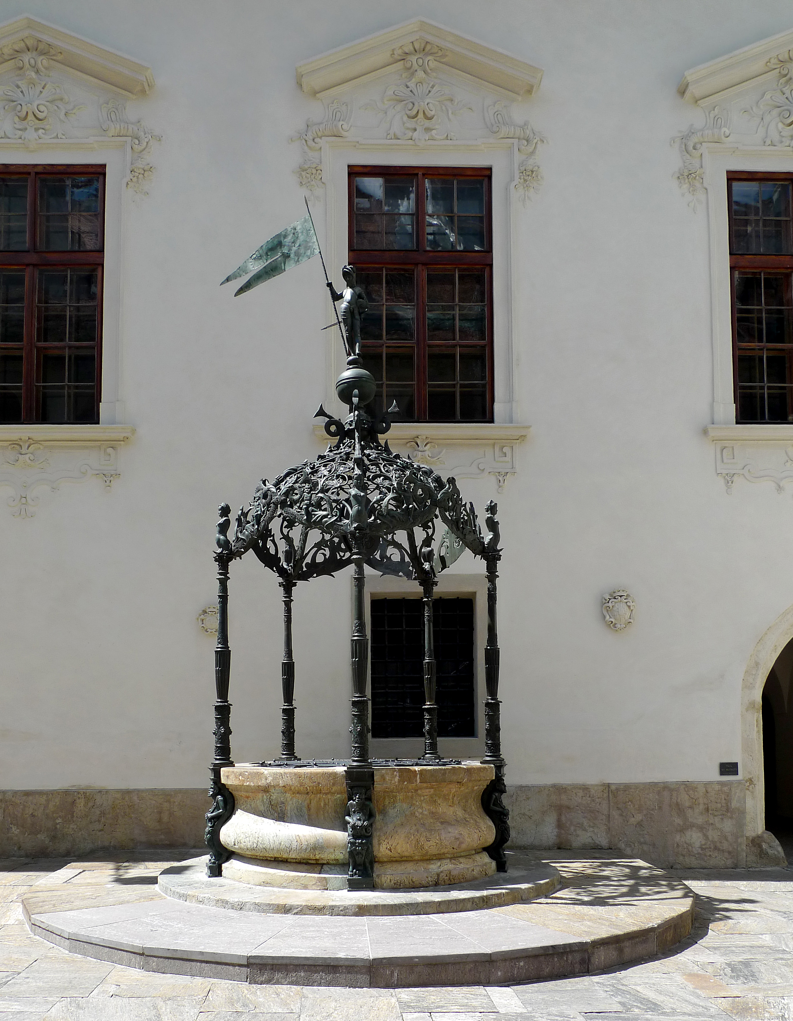 Landhaus Graz, Brunnen.